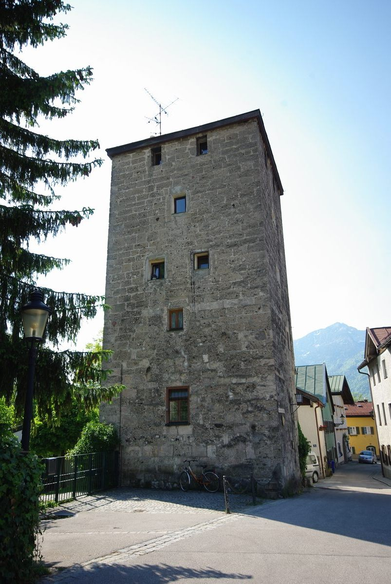 Peter-und-Paul-Turm, Bad ReichenhallThis is a photograph of an architectural monument.